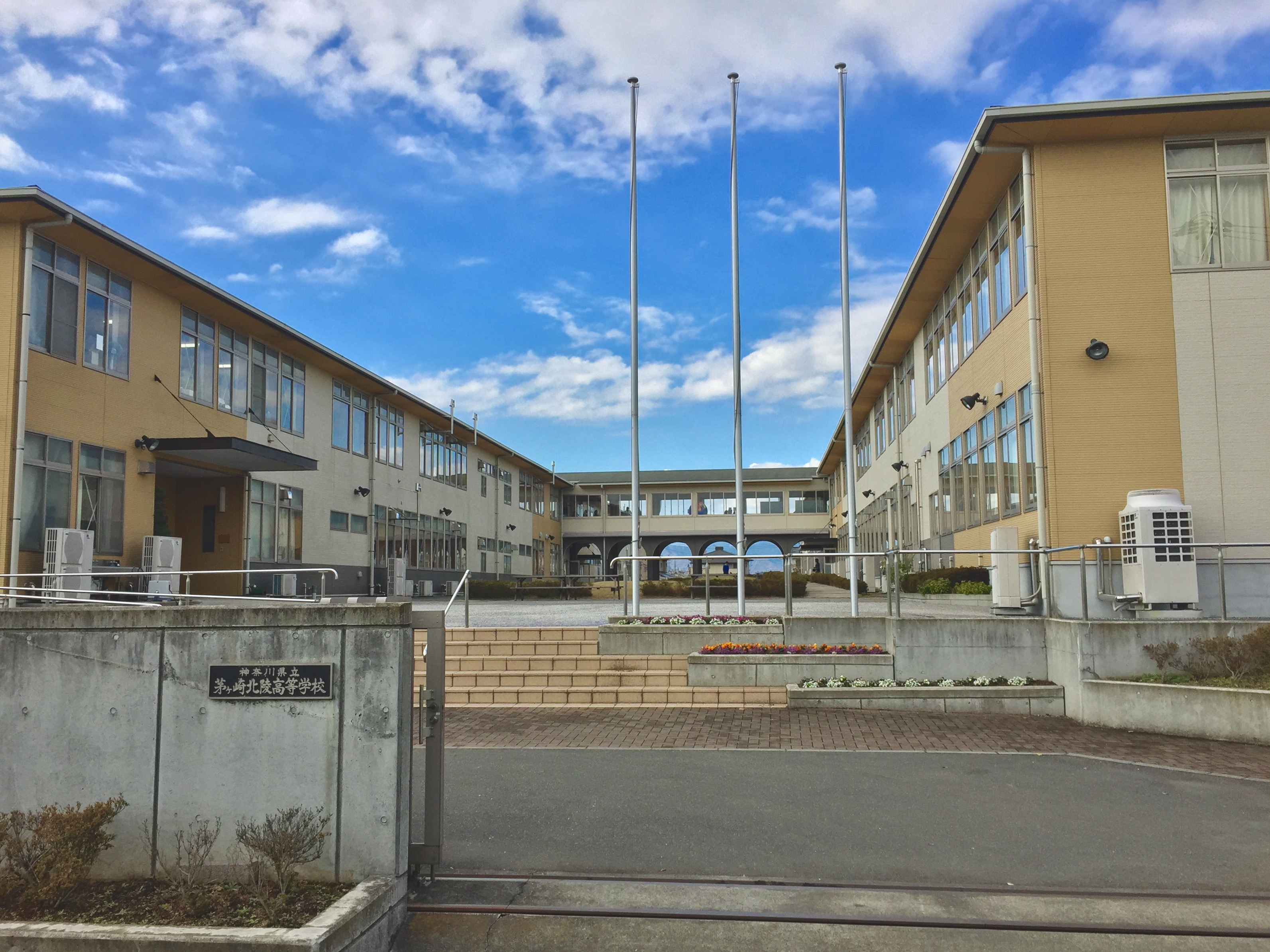 神奈川県茅ヶ崎北陵高等学校臨時校舎、正門前。2016年12月15日撮影。